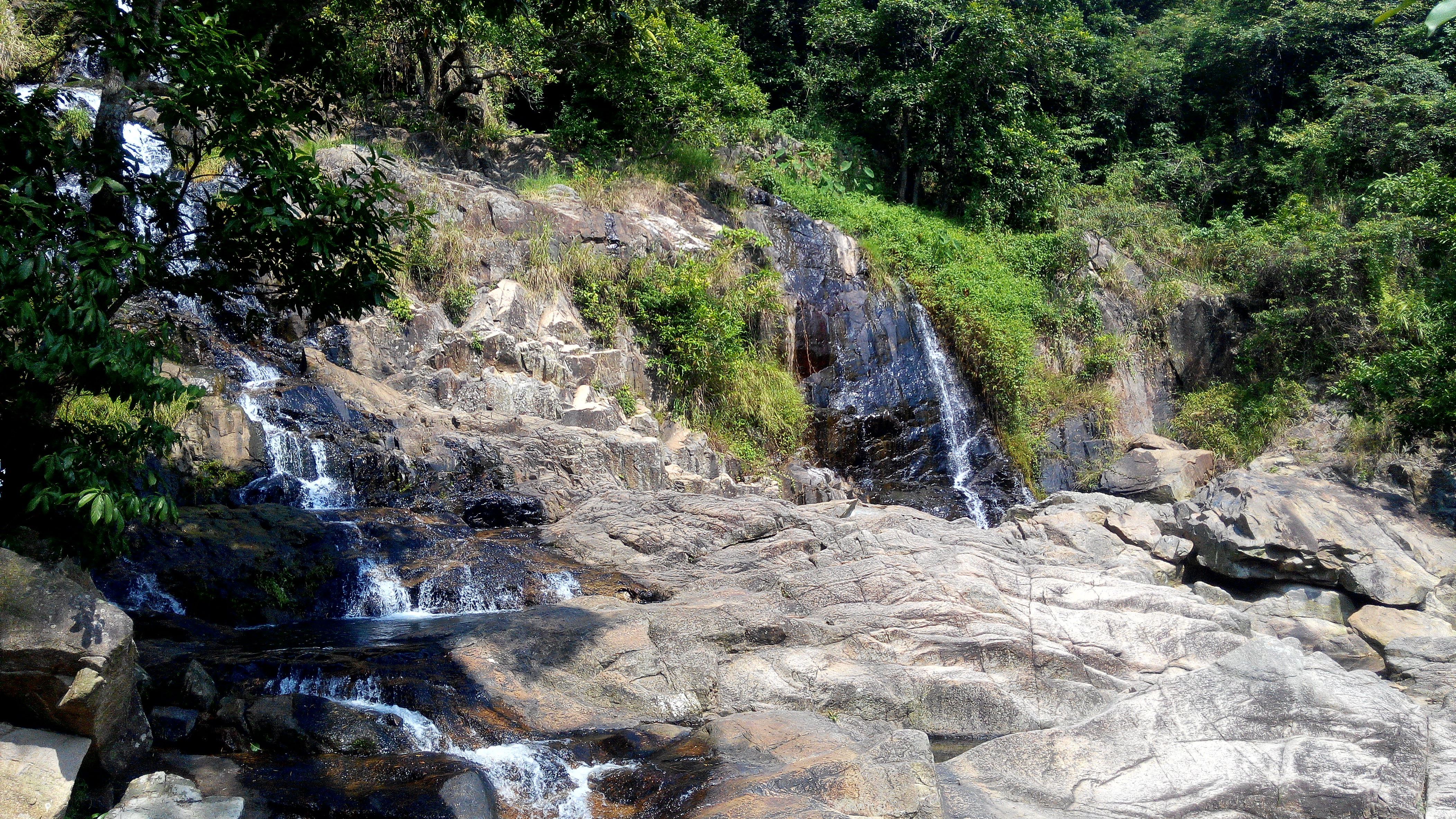 中文（香港）: 大嶼山梅窩銀礦瀑布